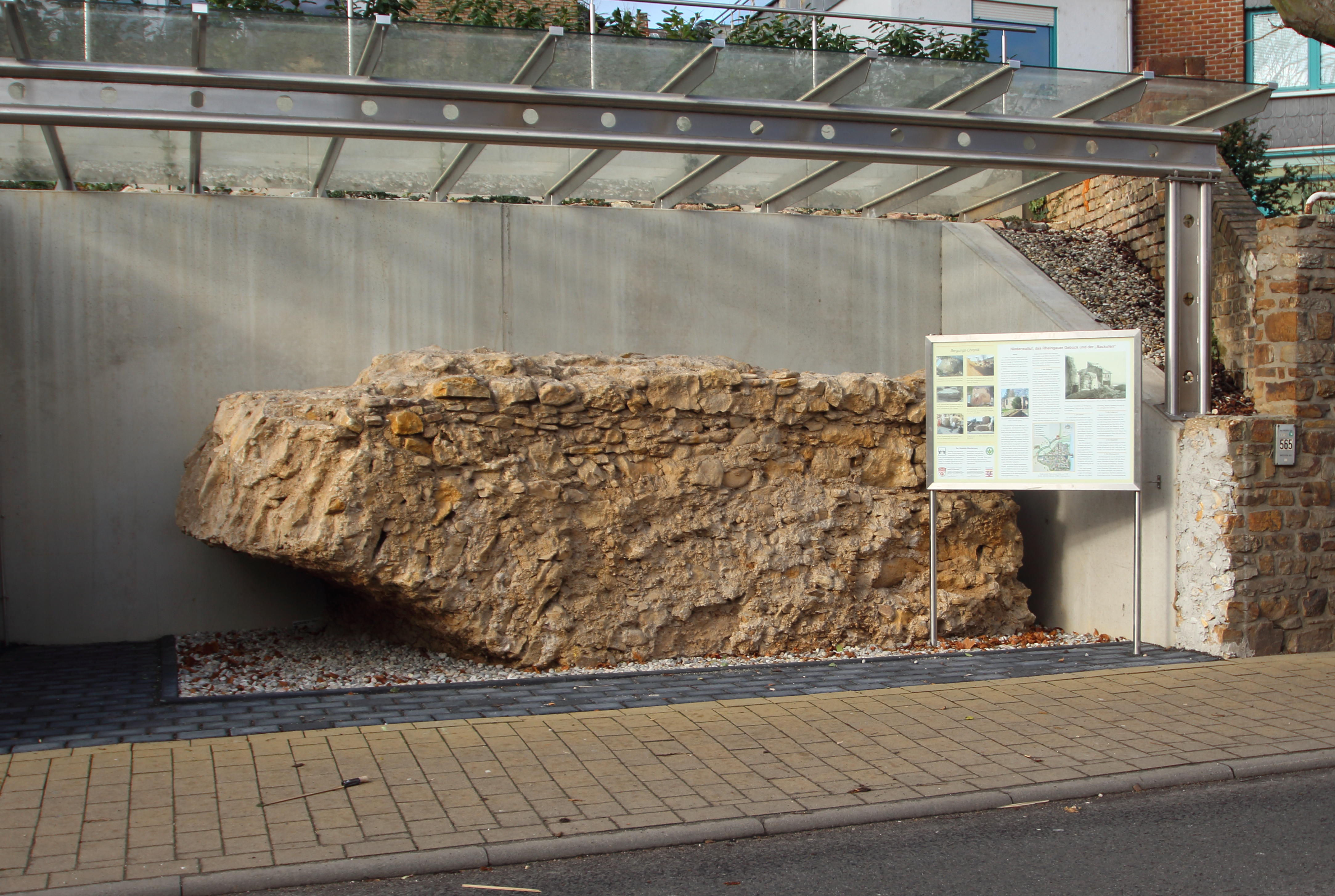 Überreste des Bollwerks Backofen, einem ehemaligen Befestigungsteil des Rheingauer Gebücks. Entstanden Ende des 15. Jhs., Sicherung ab 2013. Niederwalluf im Rheingau.Object location50° 02′ 11.45″ N, 8° 09′ 40.61″ E